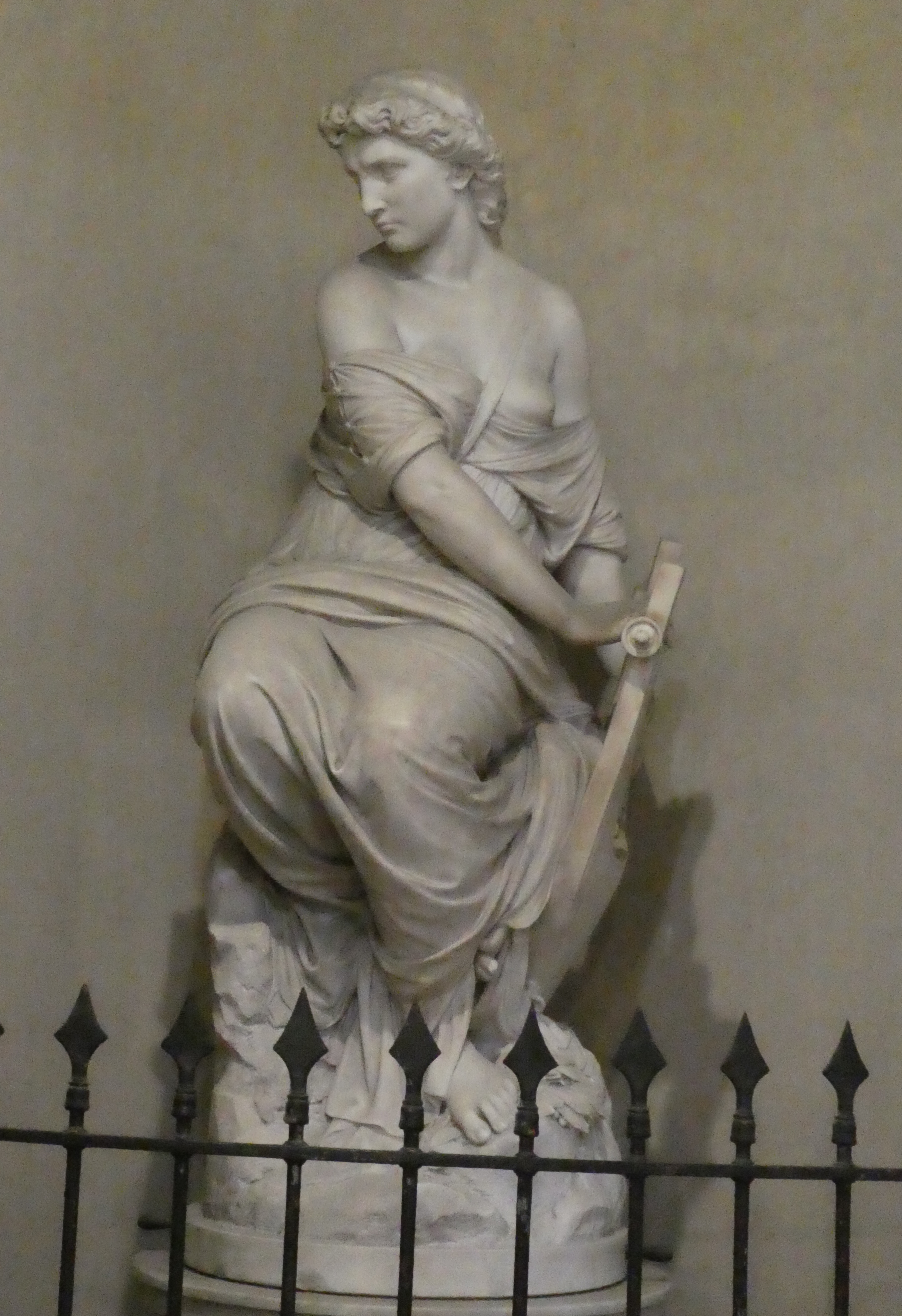 Statua raffigurante Saffo, presente nell'ingresso di palazzo Castellani, in piazza di Trevi. La statua è opera dell'artista Roberto Bompiani